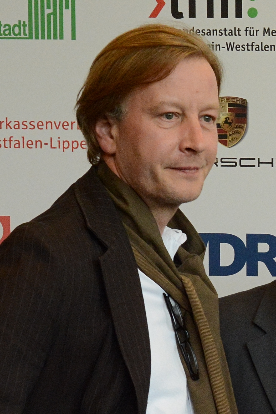 Kai Wessel bei der Verleihung des Grimme-Preises 2014.